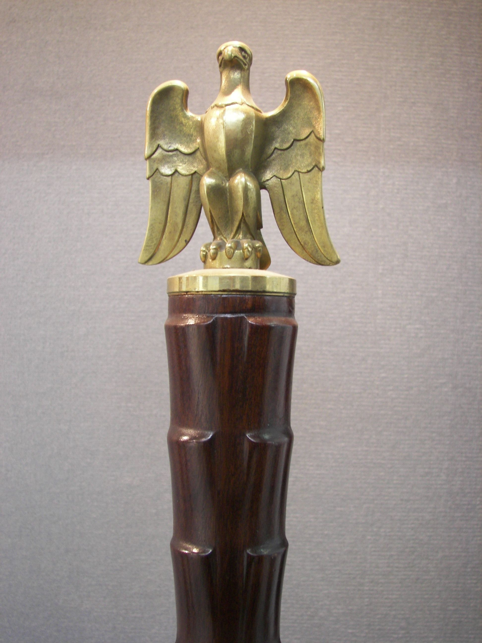 Sejm RP, Laska marszałka Sejmu używana w latach 1989 - 1993. Projektowali Wacław Wojciechowski i Tadeusz Łopieński, 1971, zdjęcie wykonane 24 stycznia 2007 roku, autor: Piotr VaGla Waglowski, / Głownia laski Marszałka Sejmu używana w latach 1989–1993. Projektowali Wacław Wojciechowski i Tadeusz Łopieński (1971).